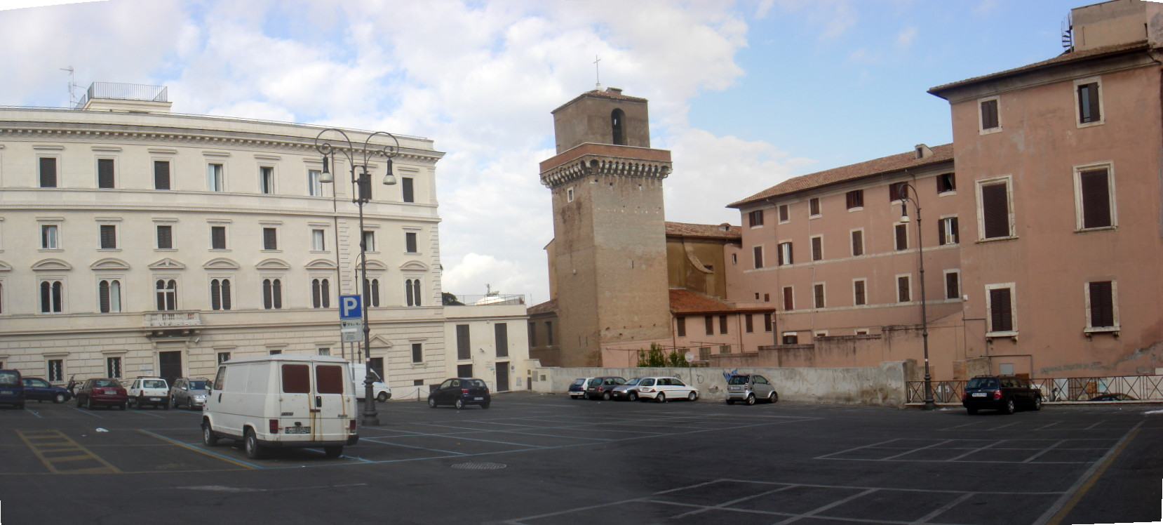 Roma, rione Monti: piazza san Pietro in Vincoli e torre dei Margani, ora campanile di San Francesco di Paola